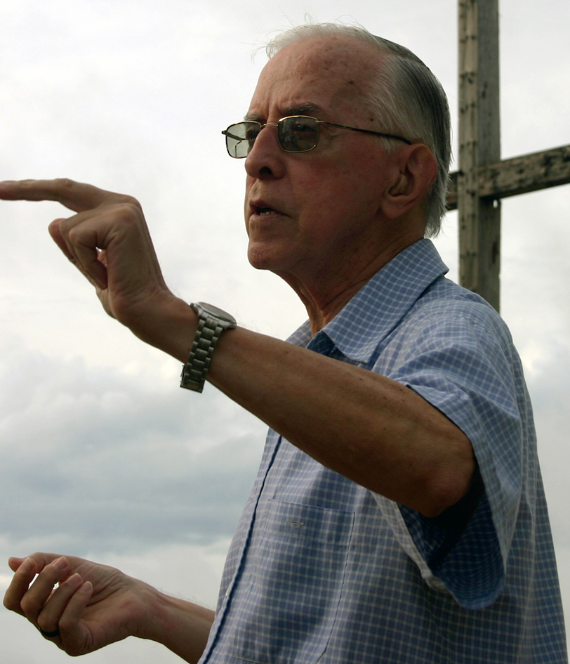 El obispo Pedro Casaldáliga ha destacado por su compromiso radical con los campesinxs sin tierra y los pueblos indígenas